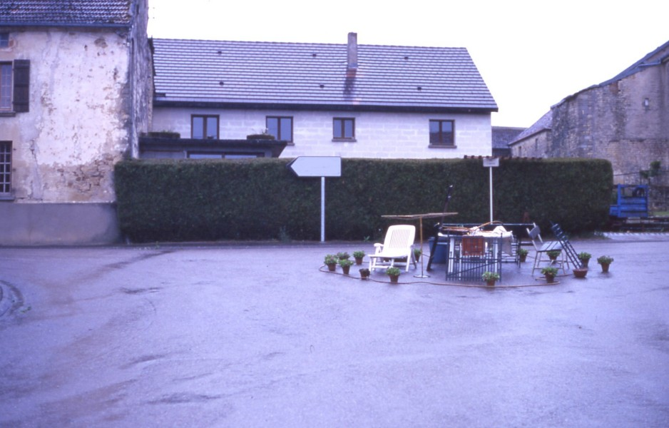 Le charivari du 1er mai